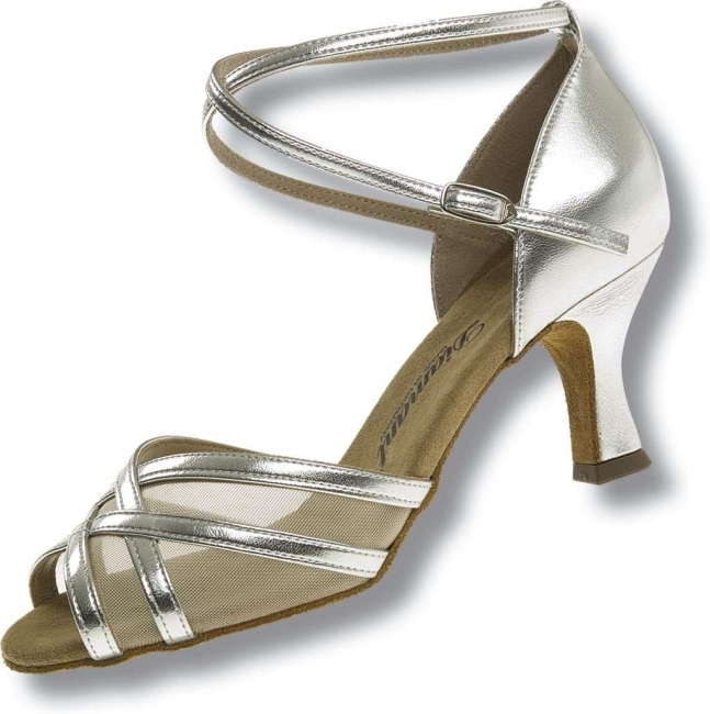 ArtNr. 035-087-013 Mod. 035 Damenschuh Weite F Normalweite Flare Absatz 6,2 cm silber Synth.